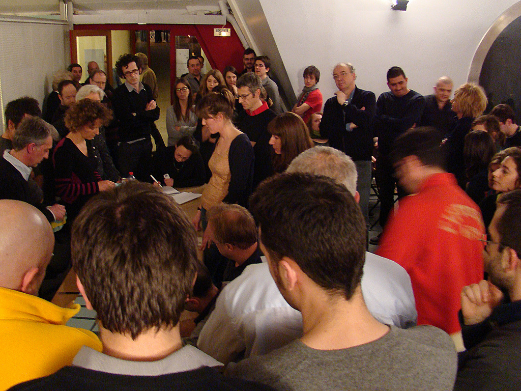 Le personnel de Libération rassemblé pour assister au dépouillement des bulletins, vers 19h, après le vote qui a eu lieu dans la journée du lundi 7 février 2011 sur la proposition de Nicolas Demorand au poste de Directeur de la rédaction.